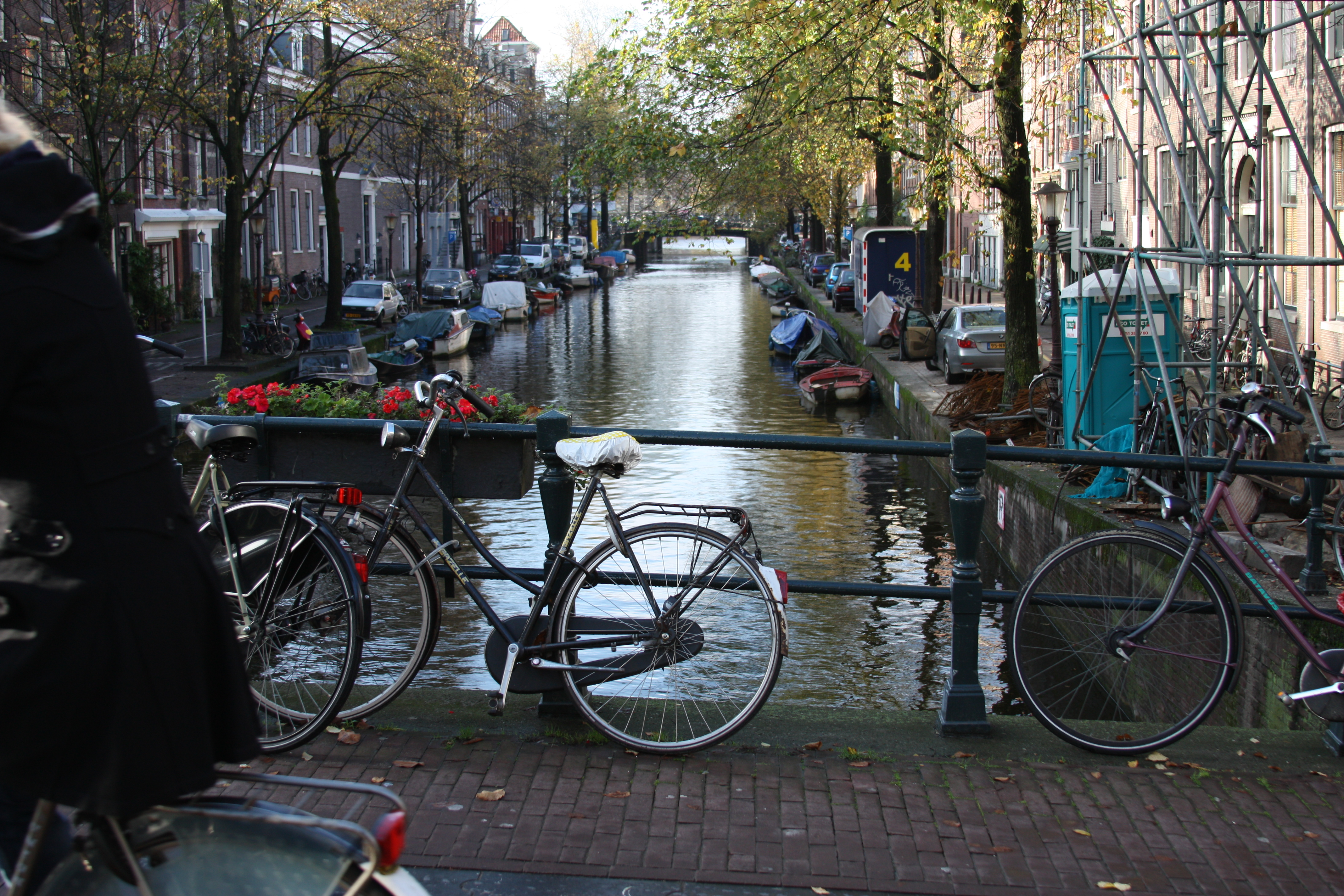 Amsterdam Zentrum